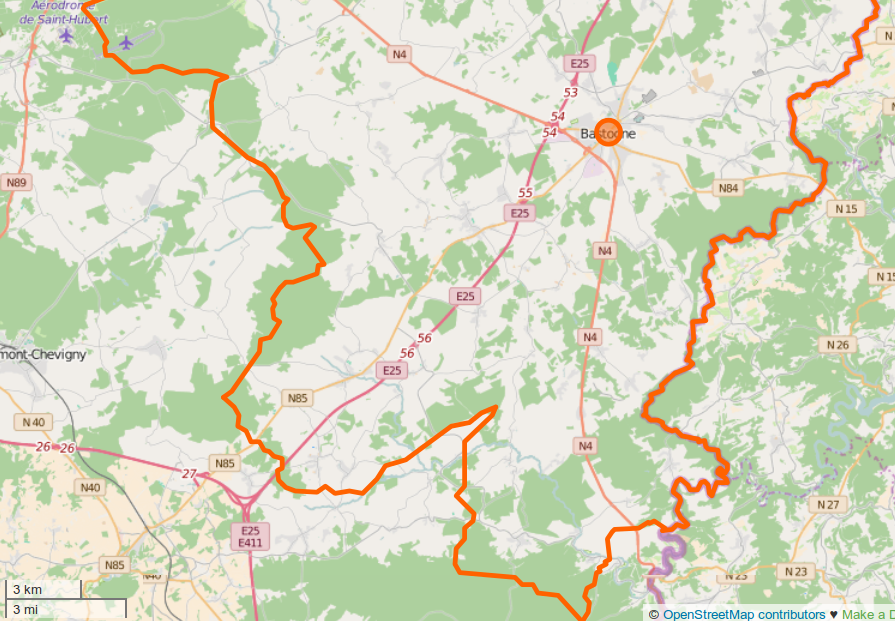 Situation de la ville de Bastogne en Belgique, OSM. This map may be incomplete, and may contain errors. Don't rely solely on it for navigation.